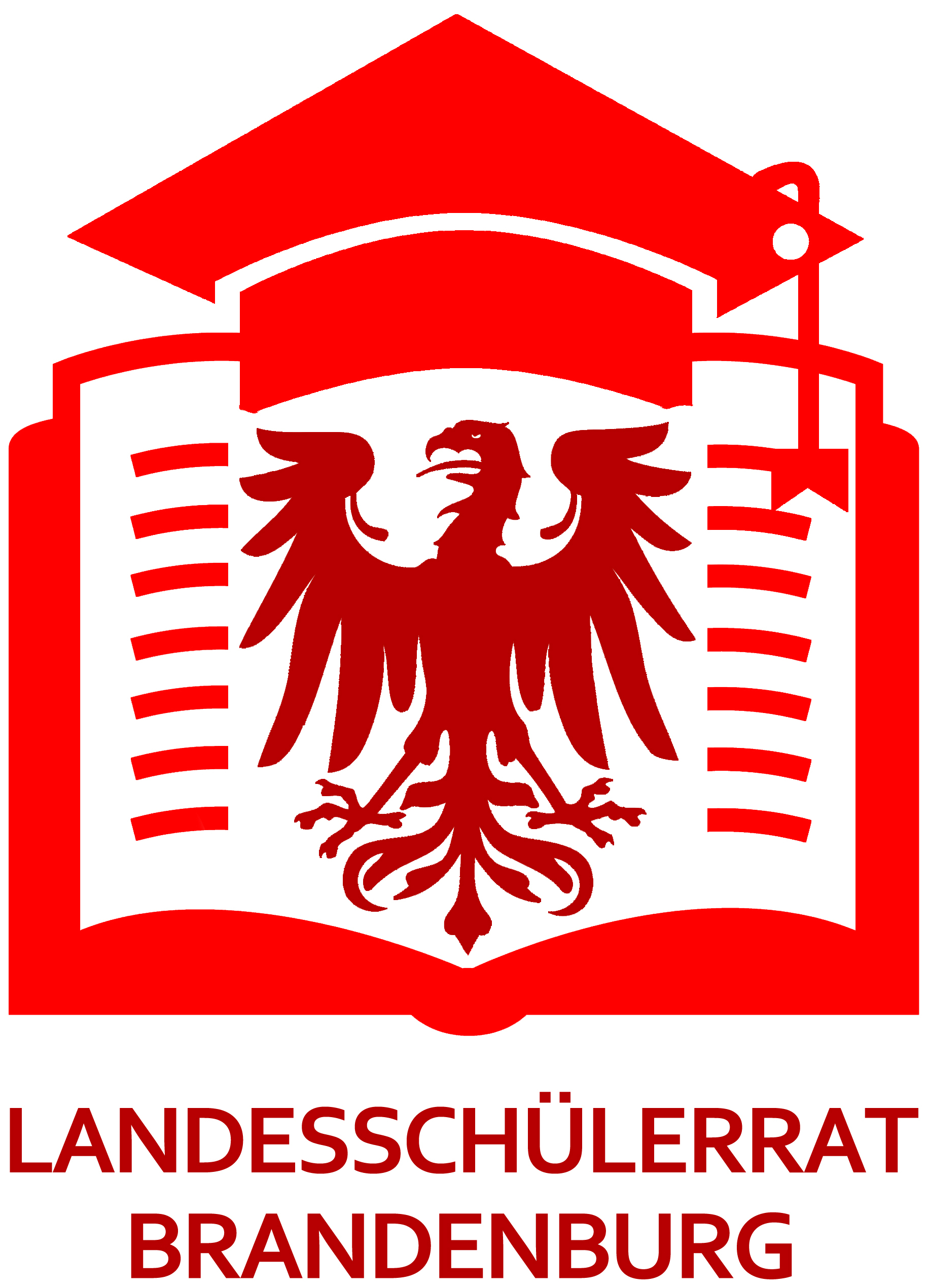 Das offizielle Logo des Landesrates der Schülerinnen und Schüler des Landes Brandenburg